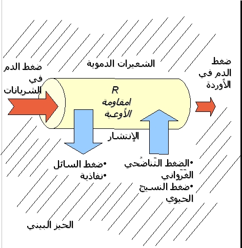 رسم توضيحي للقوى المؤثرة في التروية الدموية